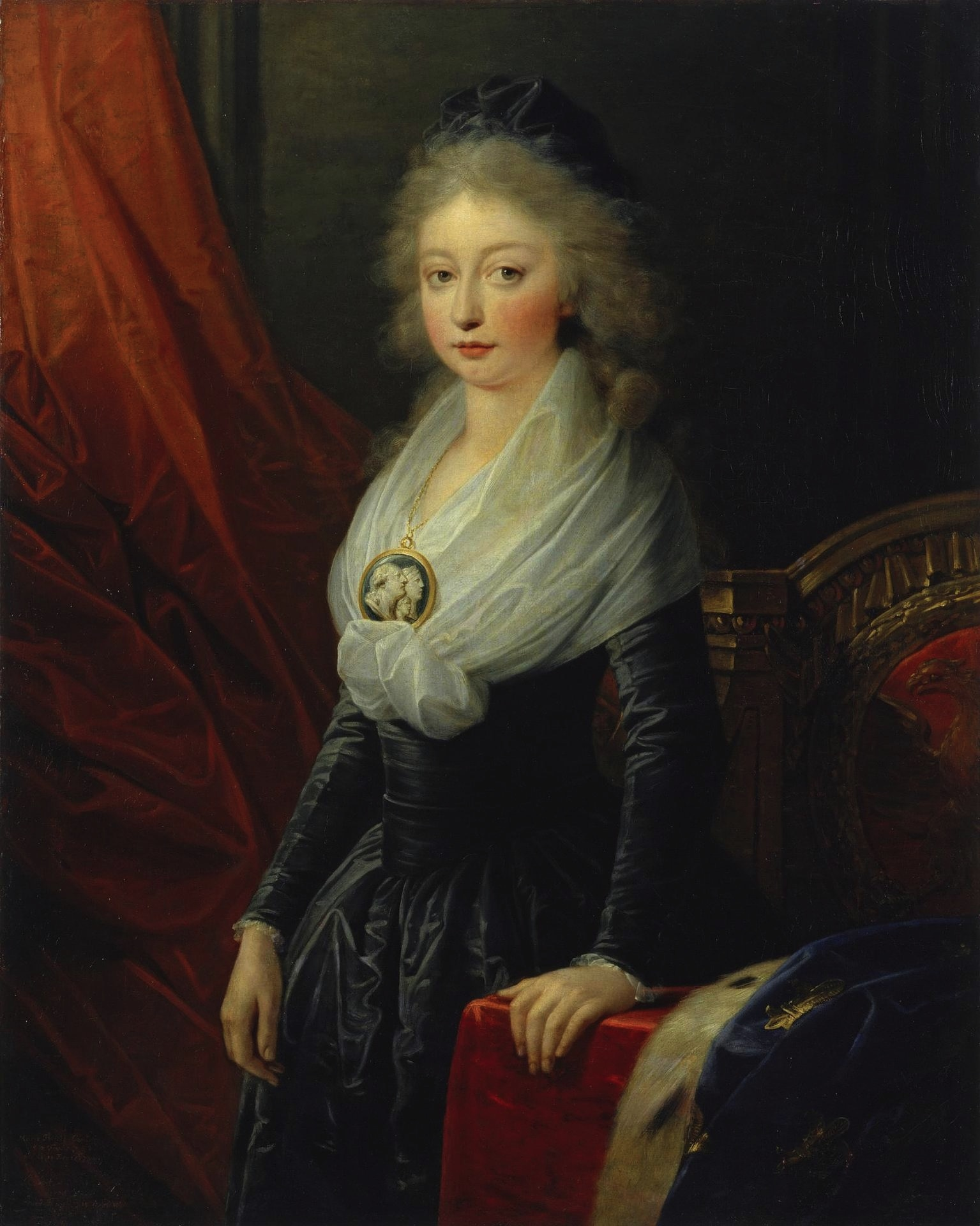 Die junge Herzogin von Angoulême; Das Bild entstand nach 1795 in Wien. Die Beschriftung lautet: "Marie Therese Charlotte France née...in 1778 peint à Vienne par...Füger". Das Gemälde selbst wurde 1859 von der Ermitage erworben. Einige Zeit befand es sich im Schloss Gattschina in der Nähe von St. Petersburg und wurde 1917 der Ermitage zurückgegeben, Ermitage St. Petersburg - Inventar-Nr. 1344.